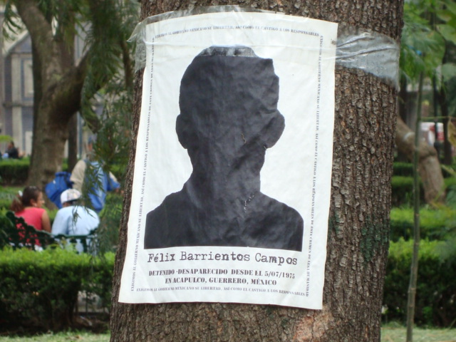 Cartel que denuncia la desaparición forzada de Félix Barrientos Campos, detenido el 5 de julio de 1975 en Acapulco (Guerrero, México) y cuyo paradero se desconoce hasta la fecha de la colocación del cartel en el año 2010. El anuncio fue colocado en uno de los árboles de la Alameda Central de la Ciudad de México.